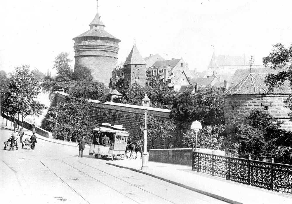 Blick von der Hallertorbrücke auf den Neutorturm im Jahr 1890. Die Pferdestraßenbahn biegt nach rechts zum Hallertor ab.